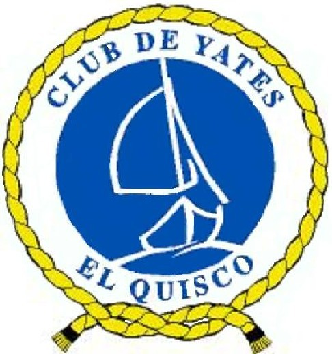 El Club de yates El Quisco se ideó por iniciativa de Alfonso Gondeck, con una reunión en su casa el 19 de marzo de 1949 a las 15:00 para desarrollar labores deportivas marítimas que incluían la pesca y el velerismo además de embarcaciones de motor